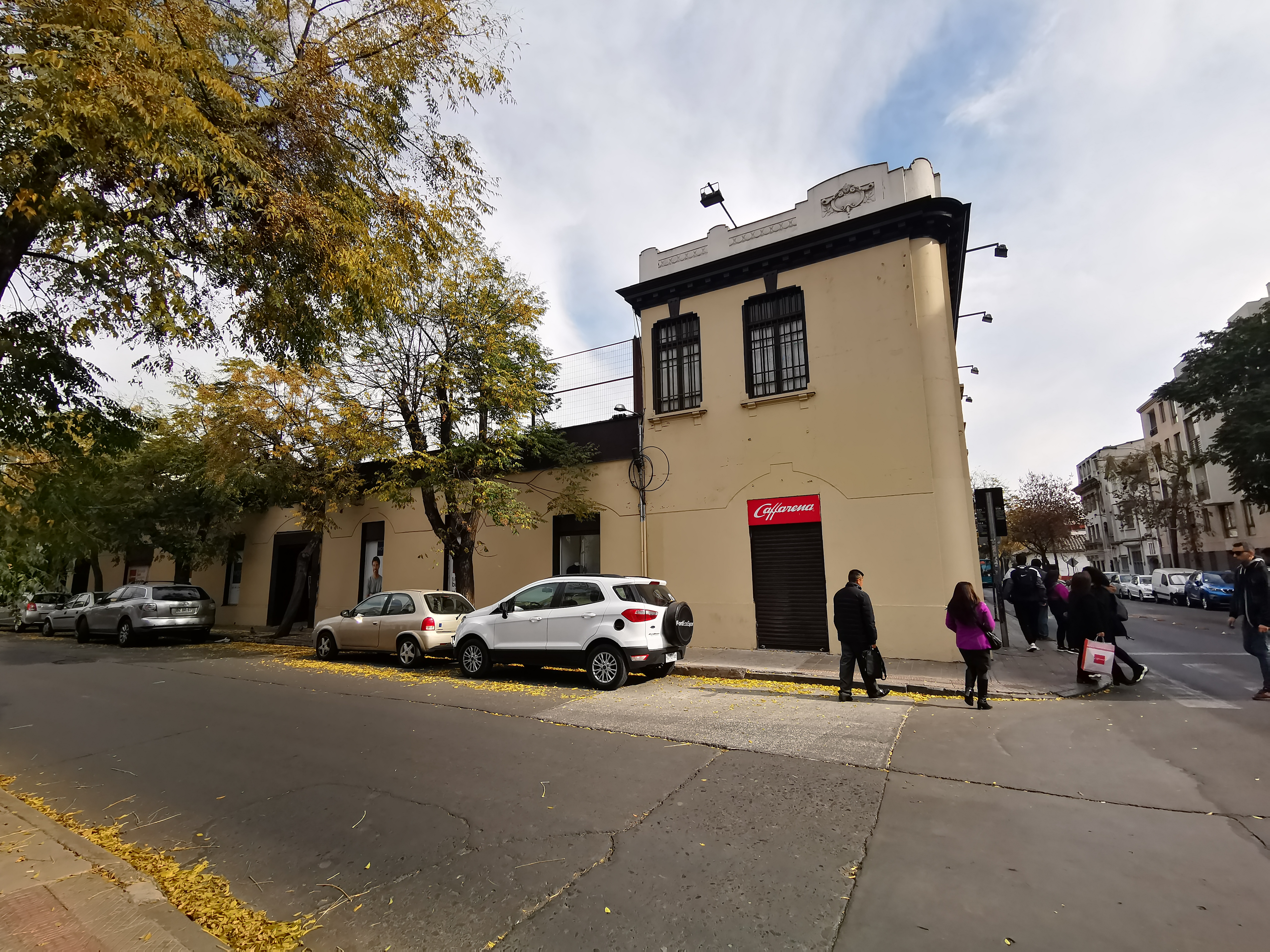 Antigua fábrica y sala de ventas de la empresa textil Caffarena.